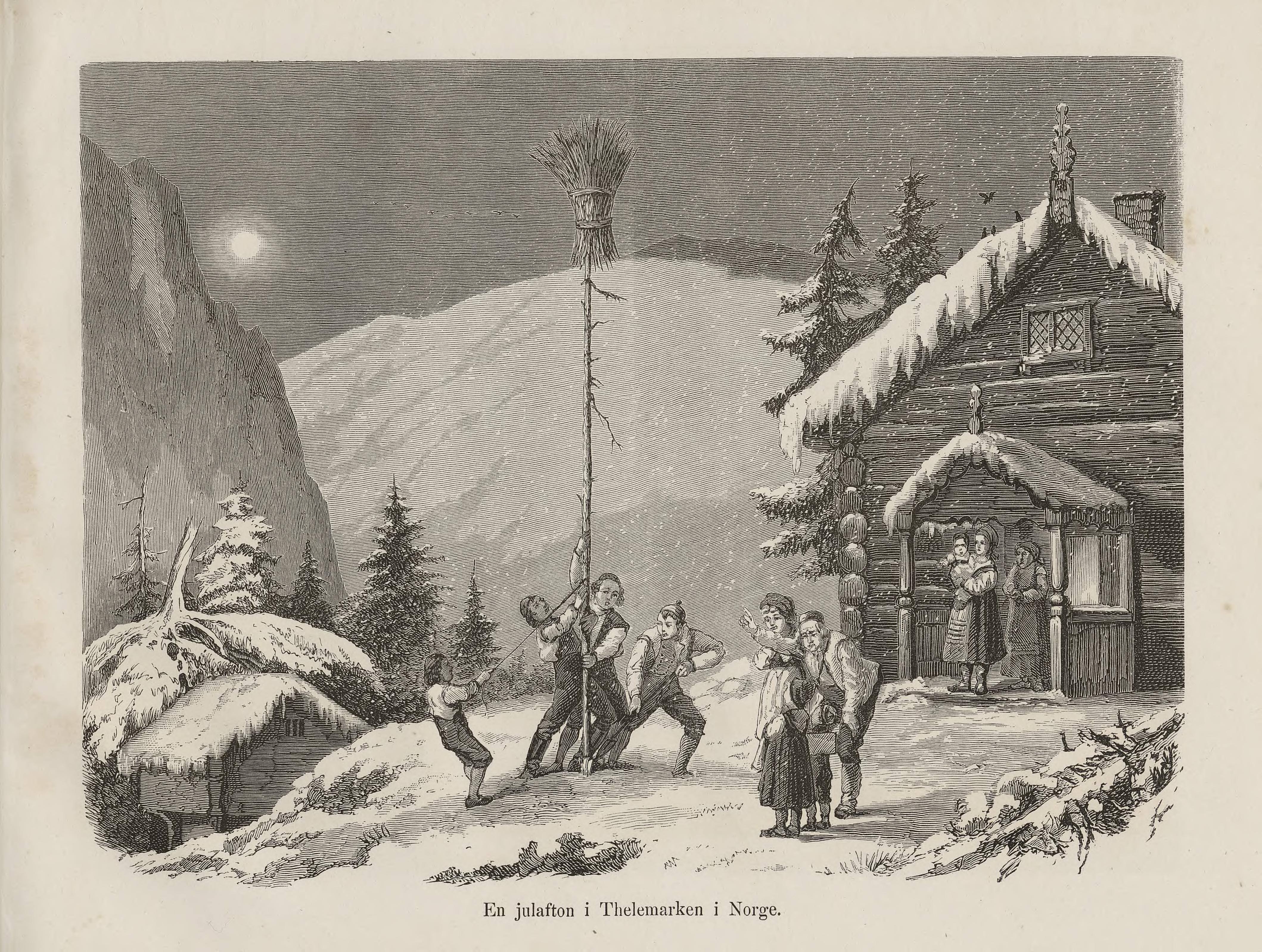 En julaften i Telemark. Julenek. Illustrasjon hentet fra boken Nordiska taflor av ukjent forfatter og utgitt av Albert Bonnier (se, 1873)